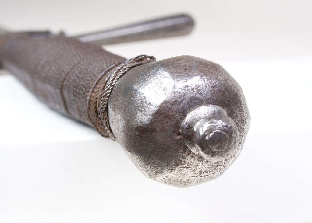 Skarprettersverd fra 1618, Norsk rettsmuseum. Sverdet ble brukt til henrettelser.